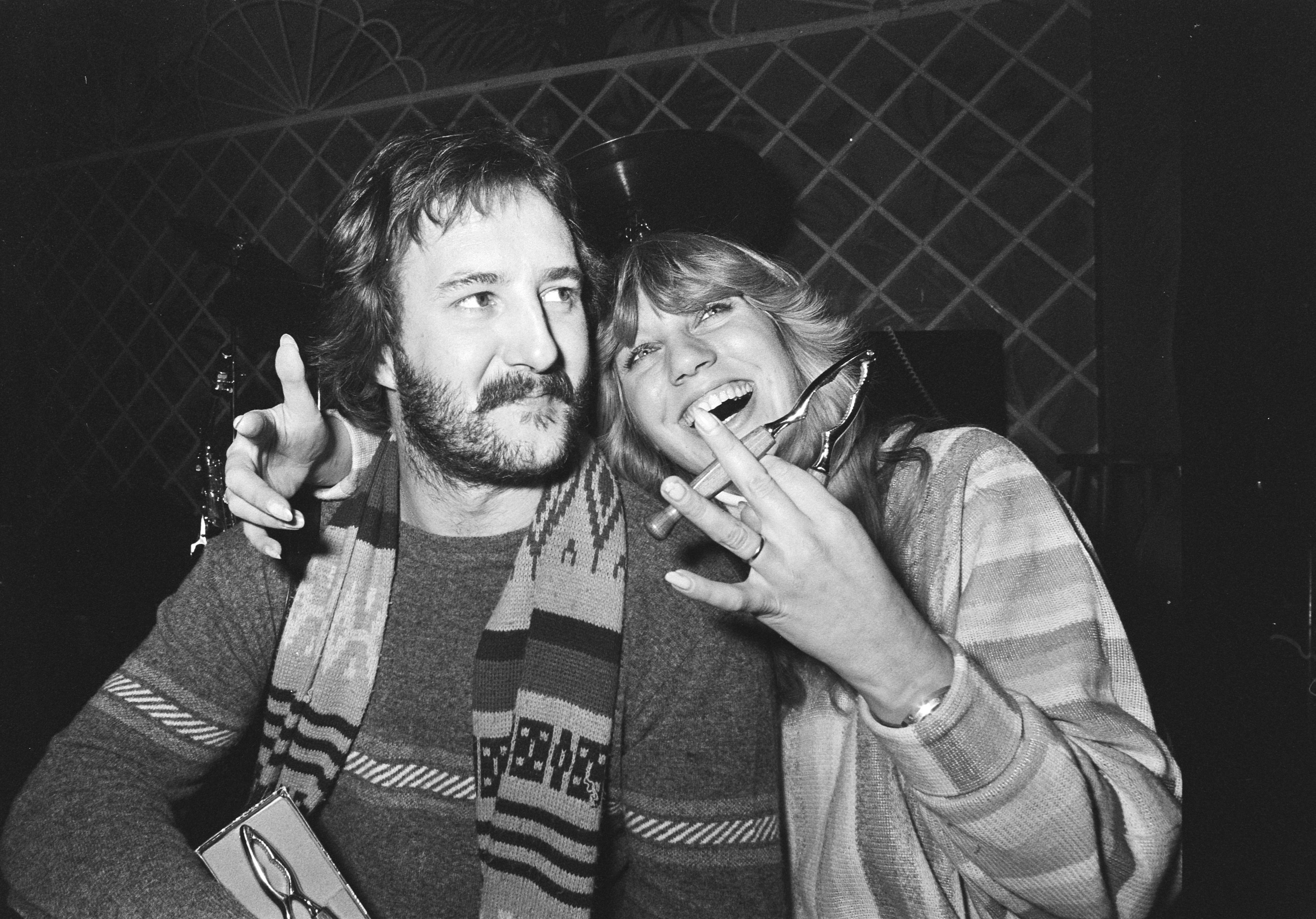 Jan Akkerman en Maggie McNeal ontvangen muziekprijs Gouden Notenkraker, 13 februari 1978